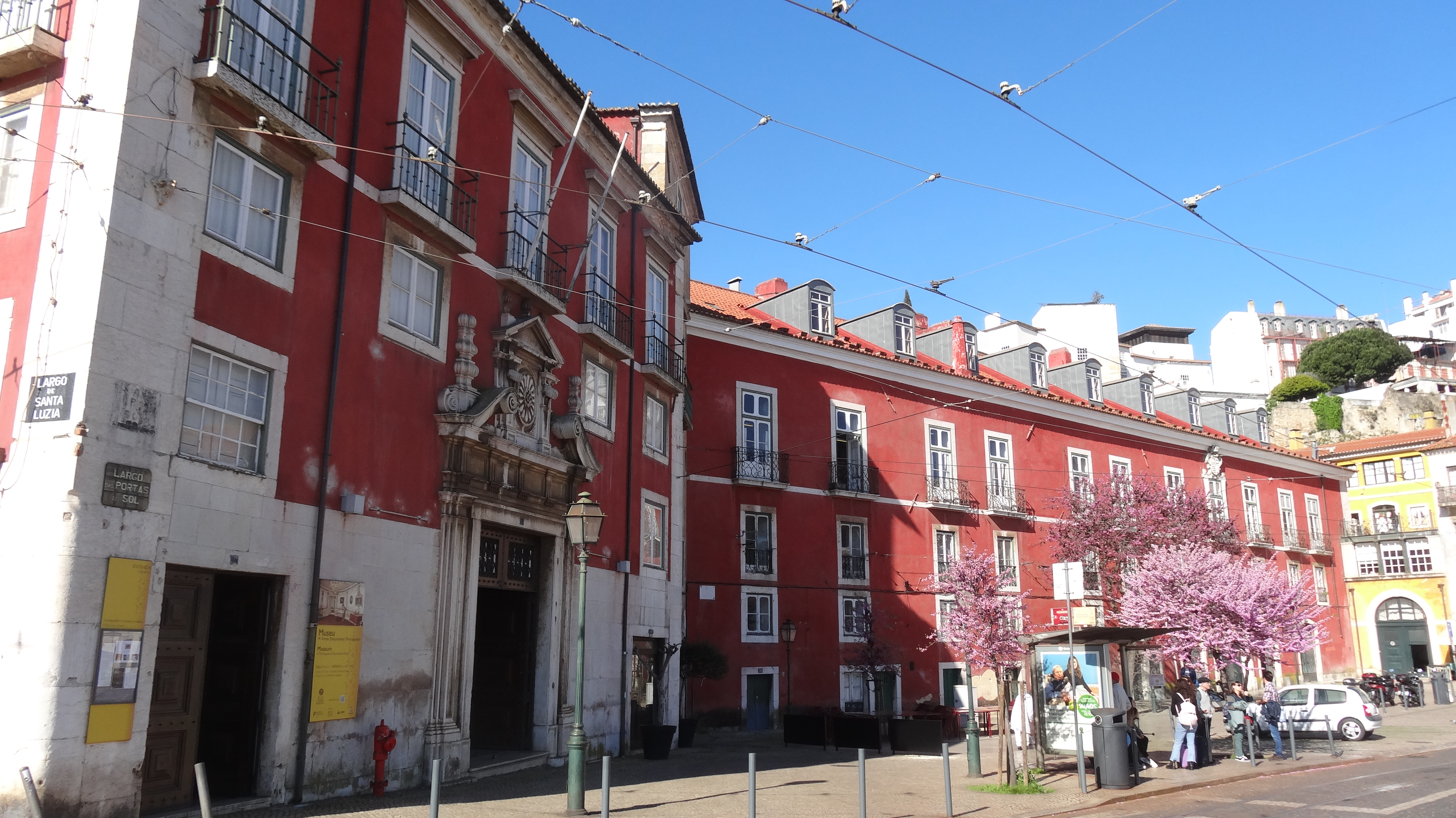 03 Porta do Sol Fundação Ricardo Espírito Santo Silva